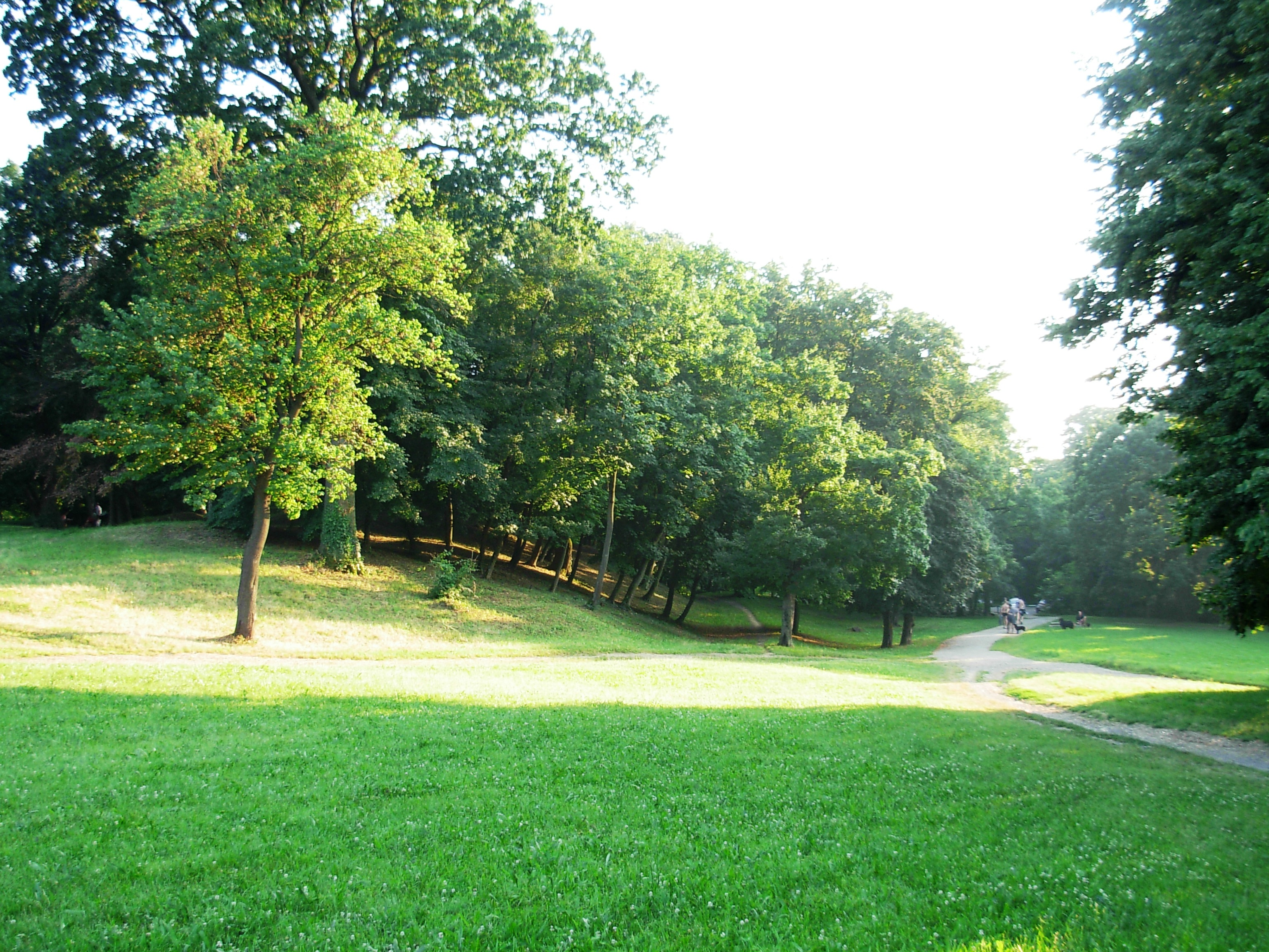 Kamenički park.